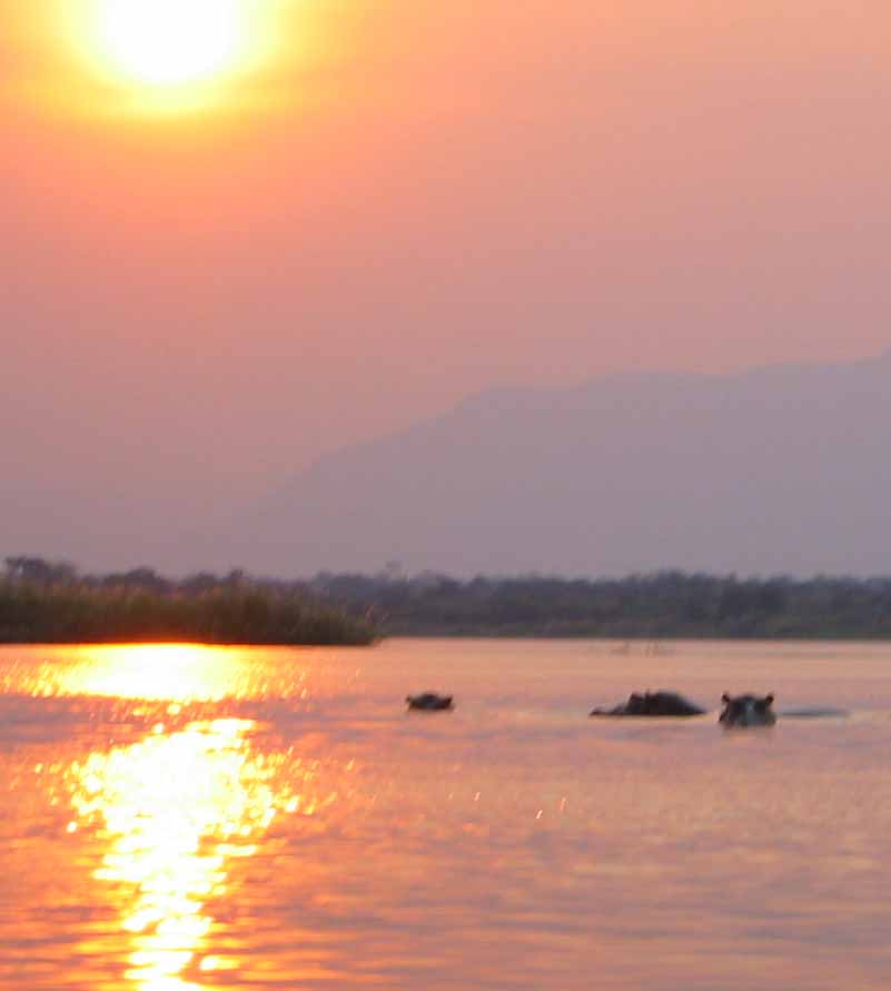 Мана Пулс